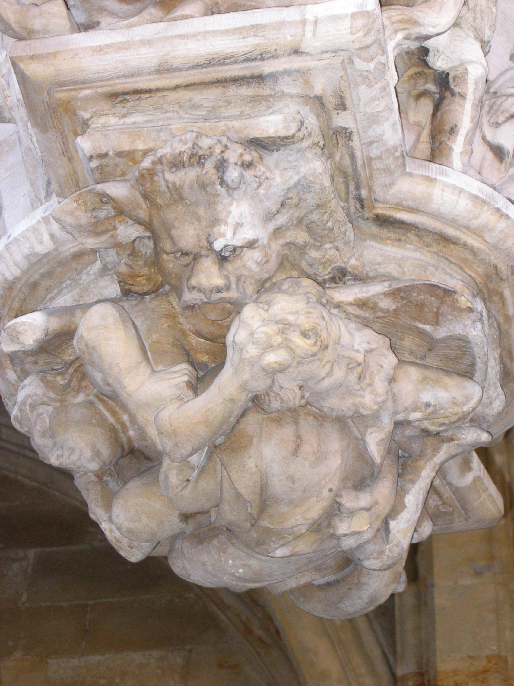 Brussels Town Hall. Hôtel de ville de Bruxelles: cul-de-four de l'aile gauche représentant le diable emportant l'âme du seigneur de Gaesbeek